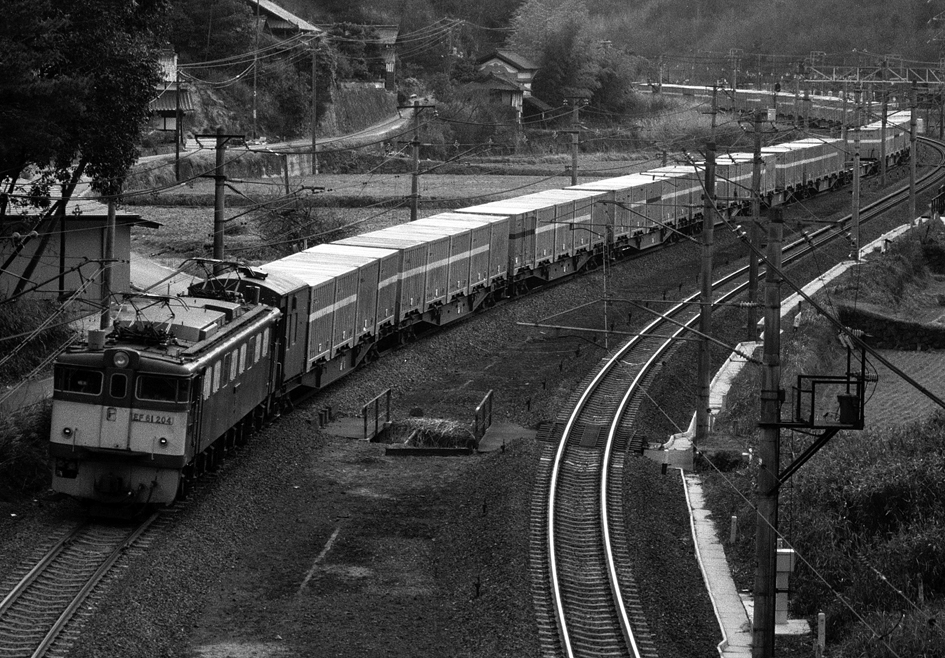 後部補機 国鉄EF61 204の貨物列車